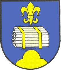 Wappen der Gemeinde Althofen in Kärnten, Österreich